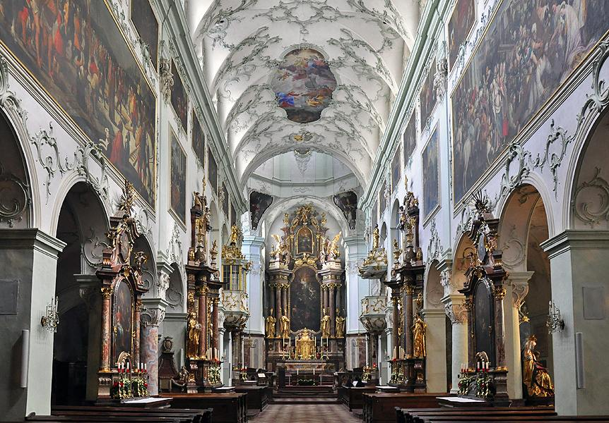 Stiftskirche St. Peter, Salzburg